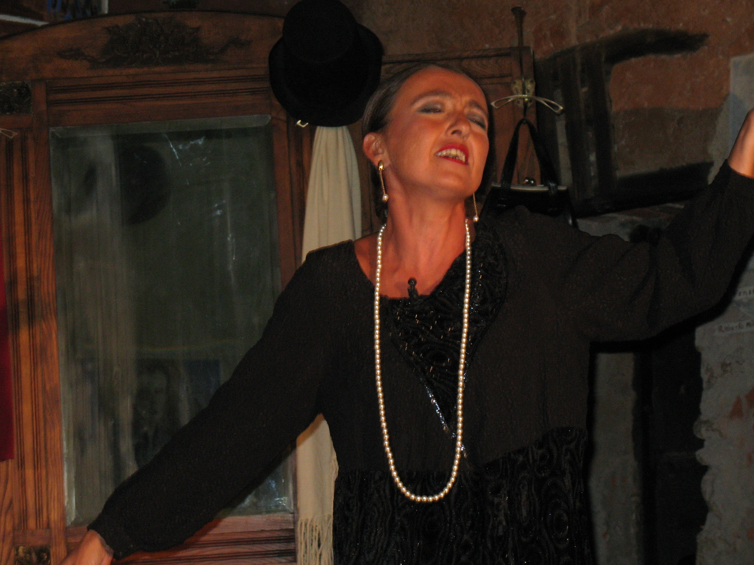 Mezzana Mortigliengo, frazione Bonda. Spettacolo: "Noi siam come le lucciole". Veronica Rocca